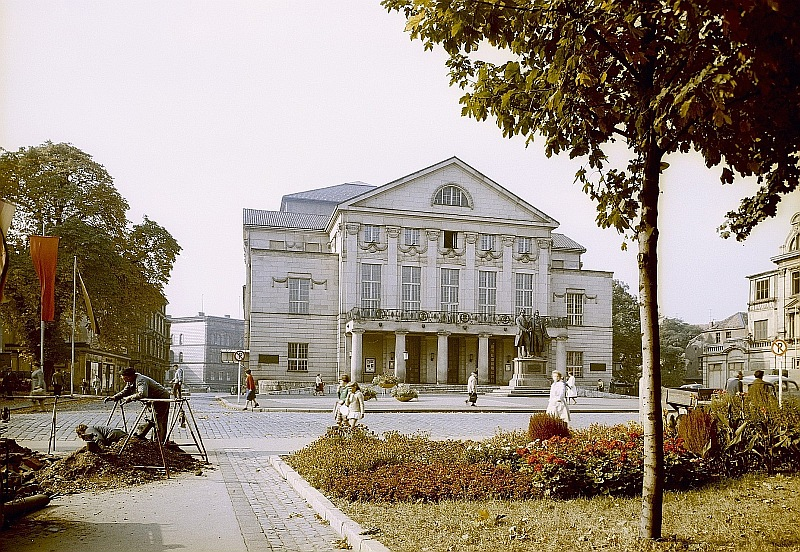 Original image description from the Deutsche Fotothek Weimar. Deutsches Nationaltheater mit Goethe- und Schiller-Denkmal von Ernst Rietschel